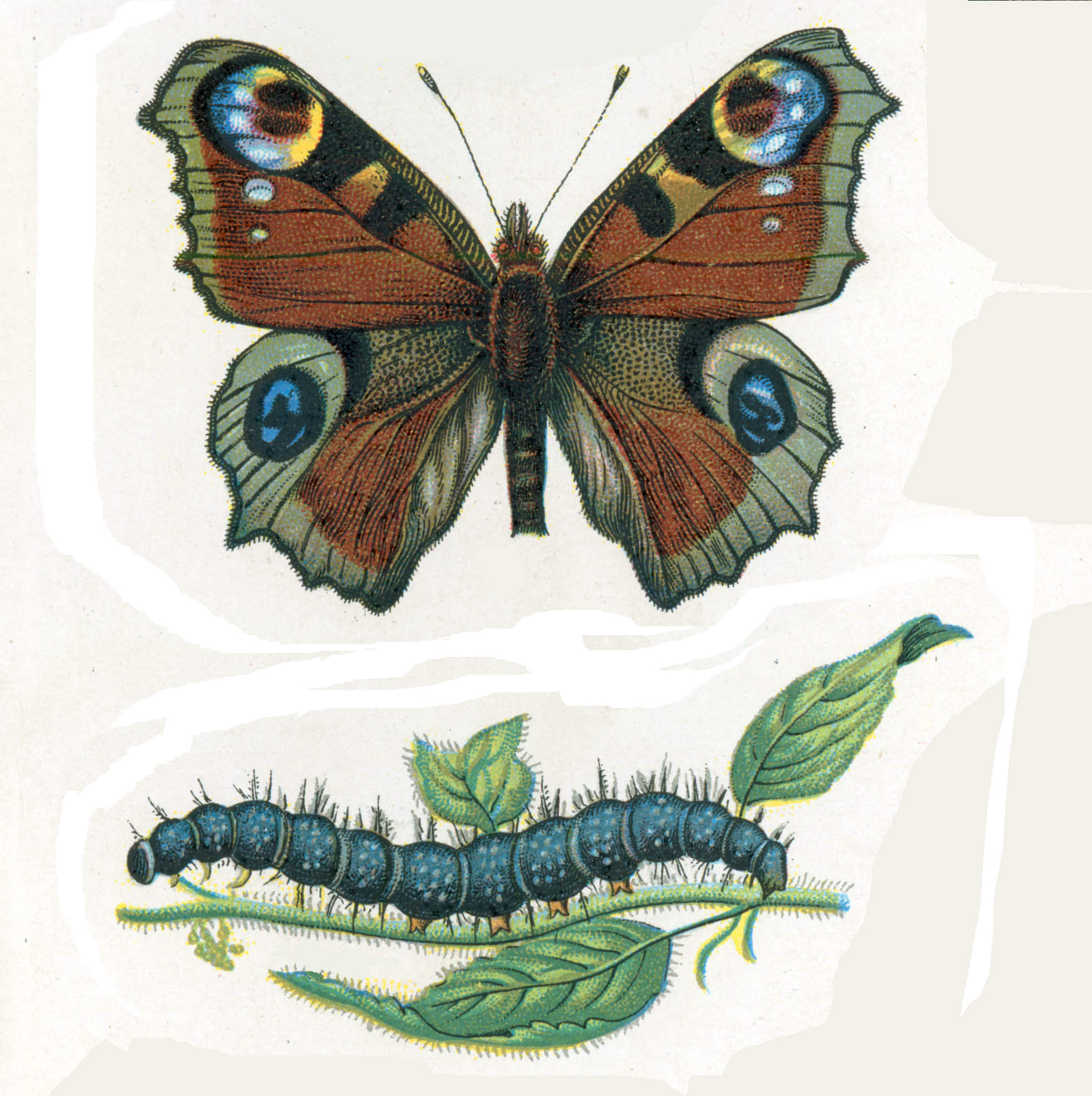 Plate III from Europas bekannteste Schmetterlinge. Beschreibung der wichtigsten Arten und Anleitung zur Kenntnis und zum Sammeln der Schmetterlinge und Raupen (ca. 1895), F. Nemos, Oestergaard Verlag, Berlin, 18 chromolithographische Tafeln, 160 pp.